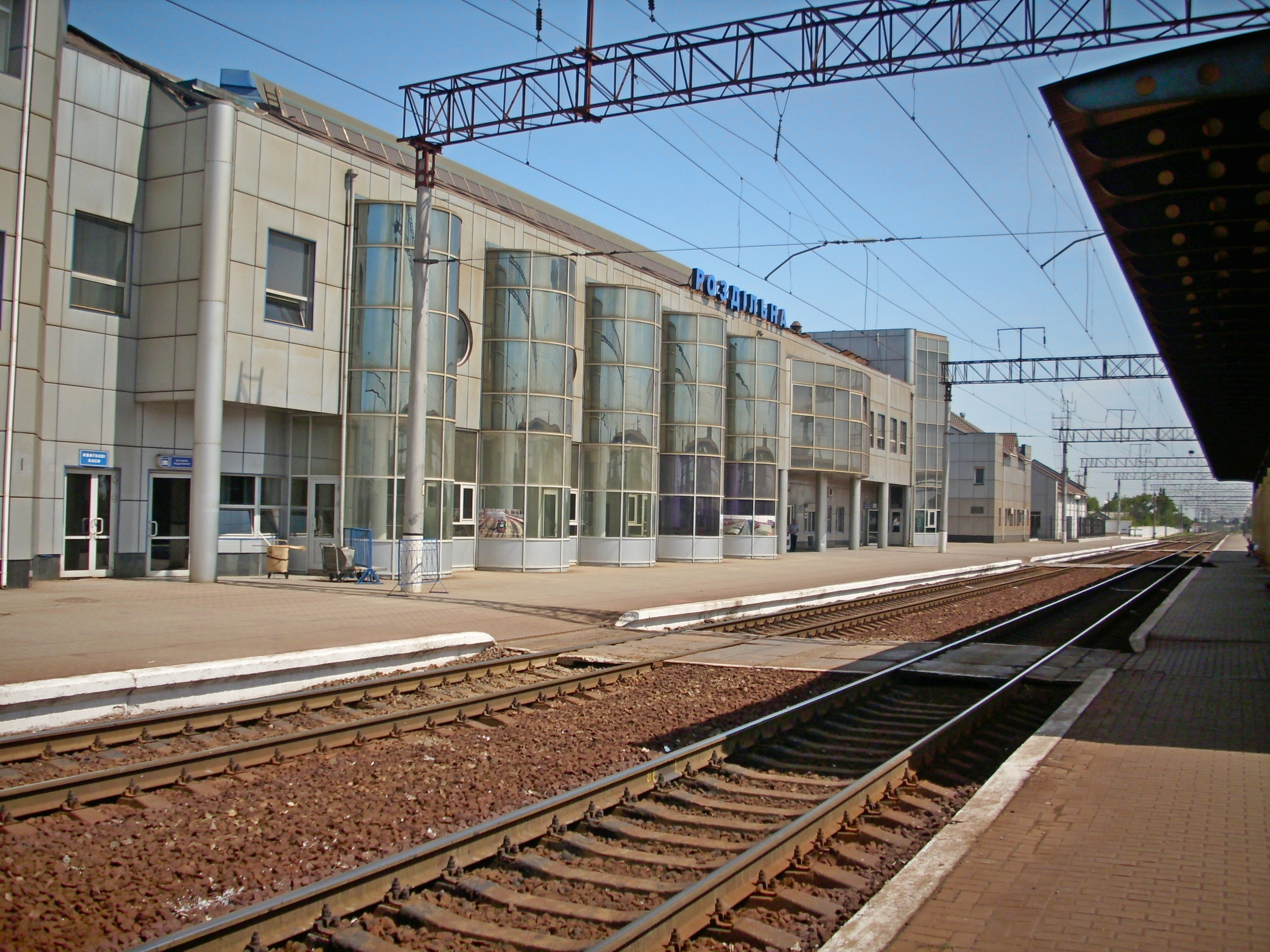 Роздільна 1